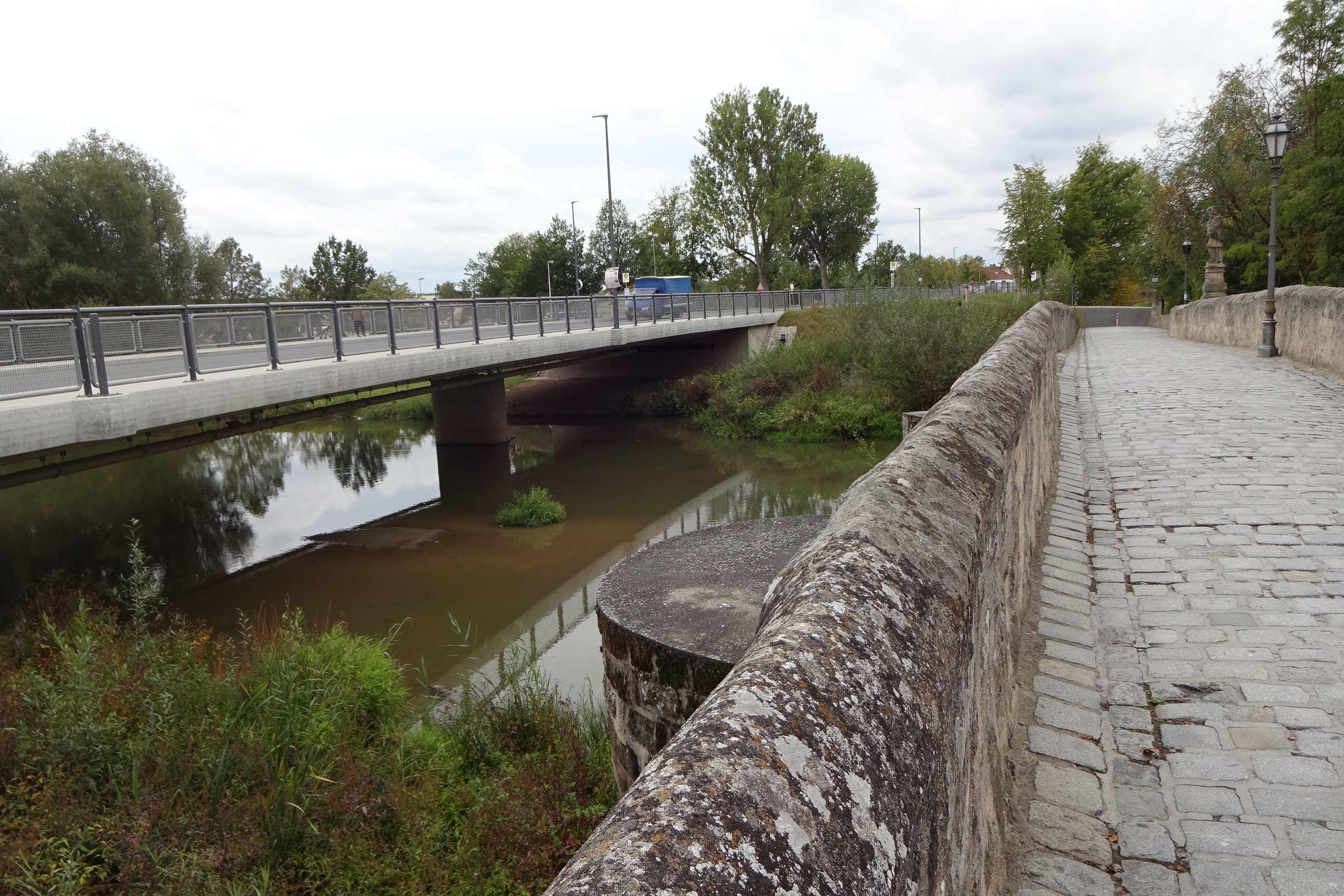 Alte Brücke von 1391 und neue Brücke von 2016 über die Aisch in Höchstadt